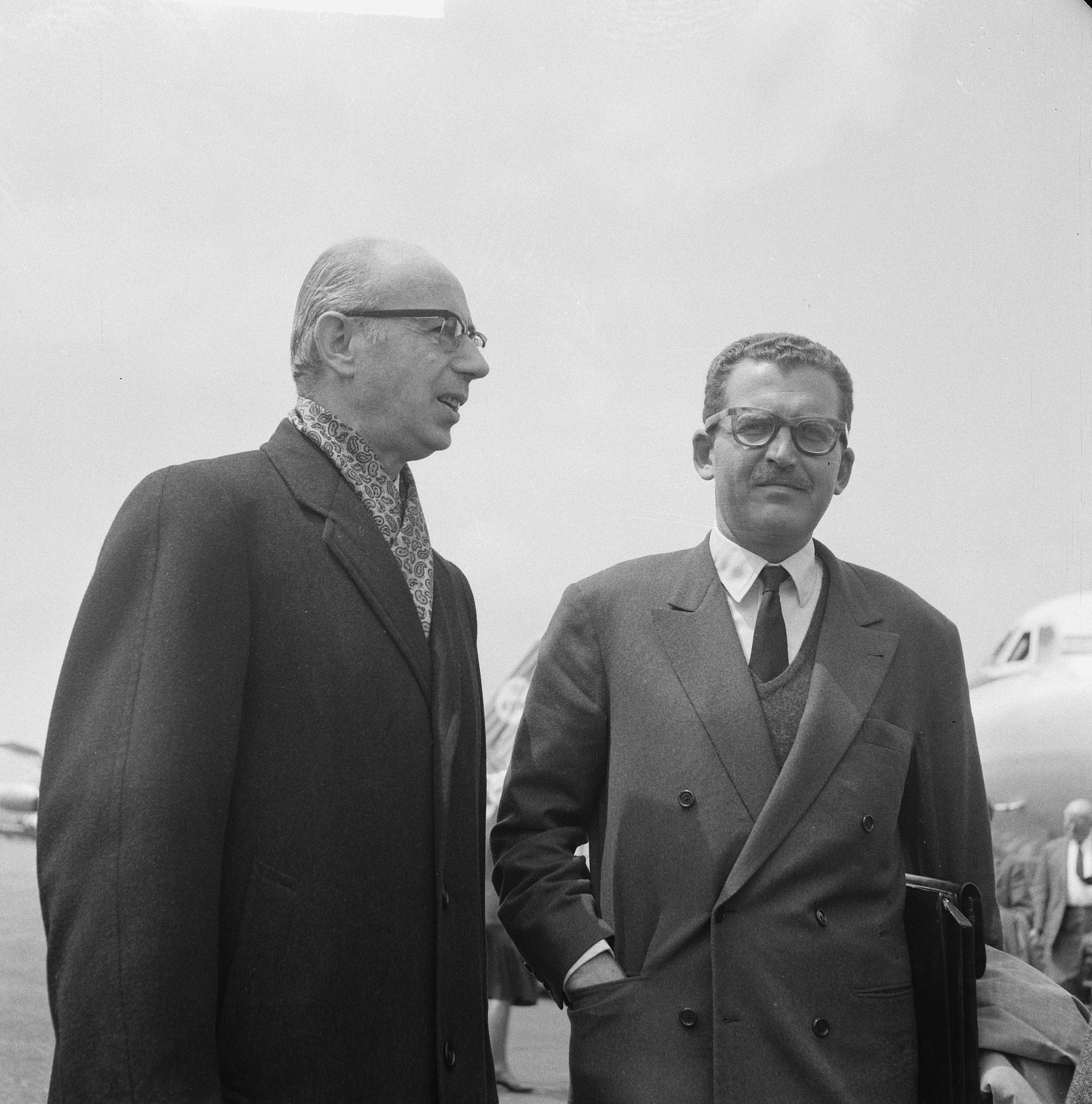 Collectie / Archief : Fotocollectie Anefo Reportage / Serie : [ onbekend ] Beschrijving : Aankomst Baron Rothschild. Baron Rothschild en de Ambassadeur van Israel Gidor Datum : 13 juni 1961 Trefwoorden : aankomsten Persoonsnaam : Baron Rothschild Fotograaf : Nijs, Jac. de / Anefo Auteursrechthebbende : Nationaal Archief Materiaalsoort : Negatief (zwart/wit) Nummer archiefinventaris : bekijk toegang 2.24.01.03 Bestanddeelnummer : 912-5911 Reacties Geplaatst door Maaike op 01 oktober 2013 - 14:59. Links H.A. Cidor en rechts baron Edmond de Rothschild Persoonsnamen: baron Edmond de Rothschild, H.A. Cidor (en geen Gidor) Plaats: Schiphol; Noord-Holland